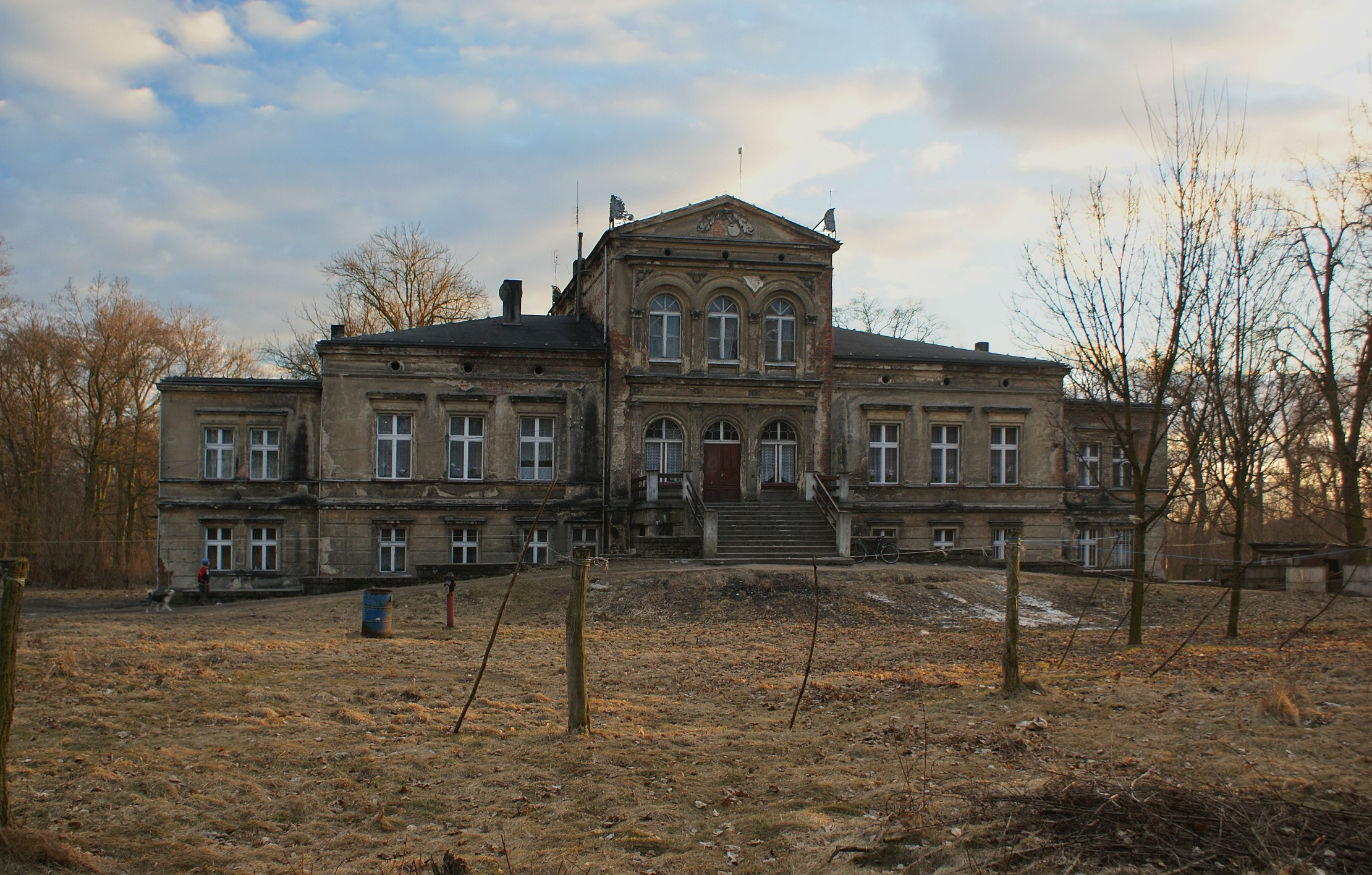 Fasada północna rezydencji z 1875 r., z parkiem pałacowym. Rososzyca, Sieroszewice 03.1973.